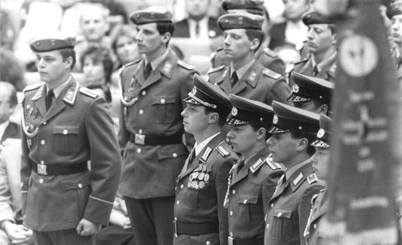 ADN-ZB-Mittelstädt-20.4.86-kb-Berlin: XI. SED-Parteitag- Eine Abordnung der NVA und der Grenztruppen der DDR überbrachte zum Abschluß des vierten Beratungstages dem höchsten Forum der Partei einen kämpferischen Soldatengruß.